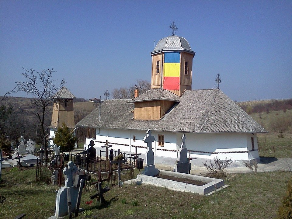 Biserica de lemn „Sf. Nicolae”